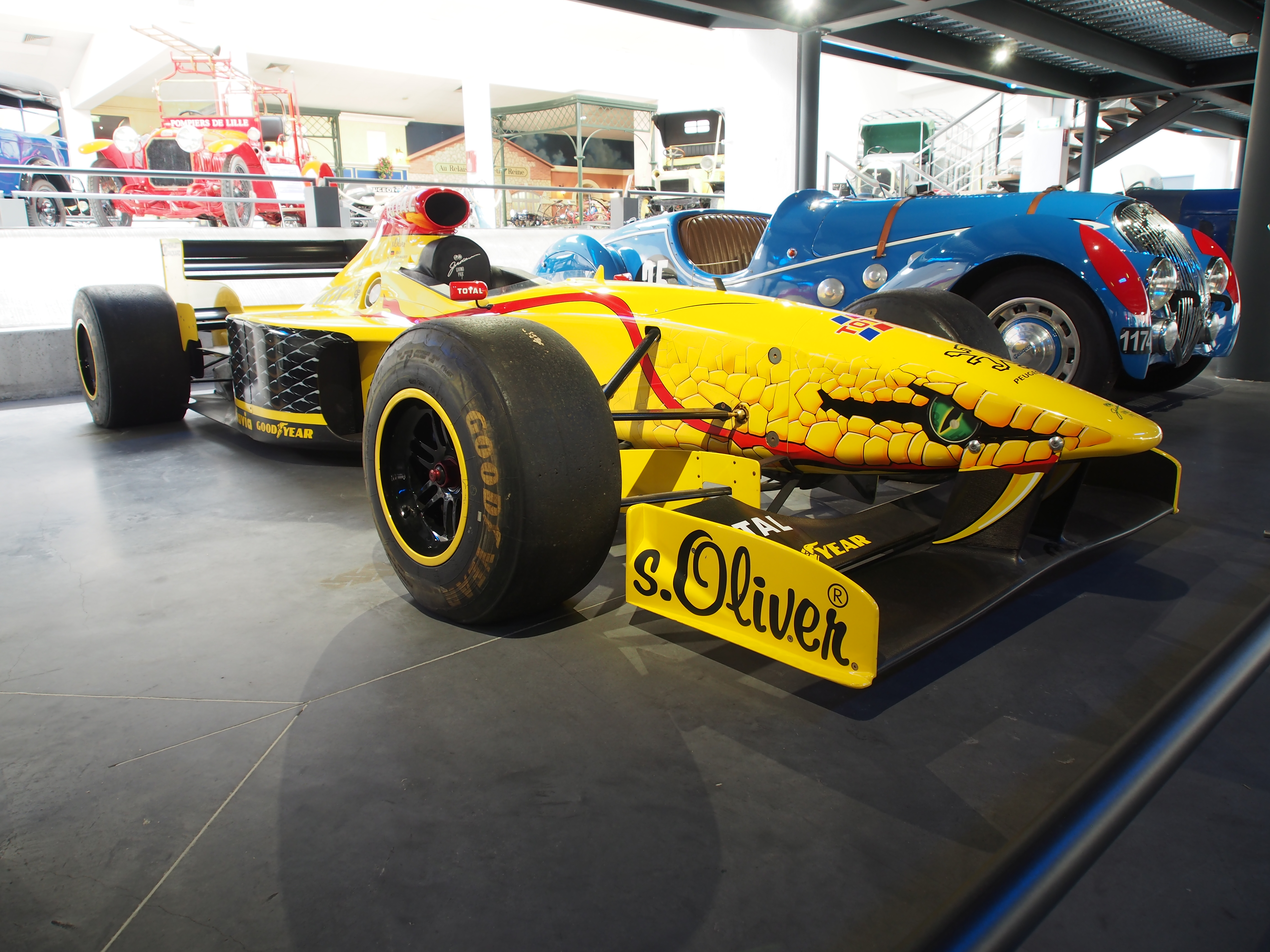 Photographed at the Musée de l'Aventure Peugeot-Sochaux, France.